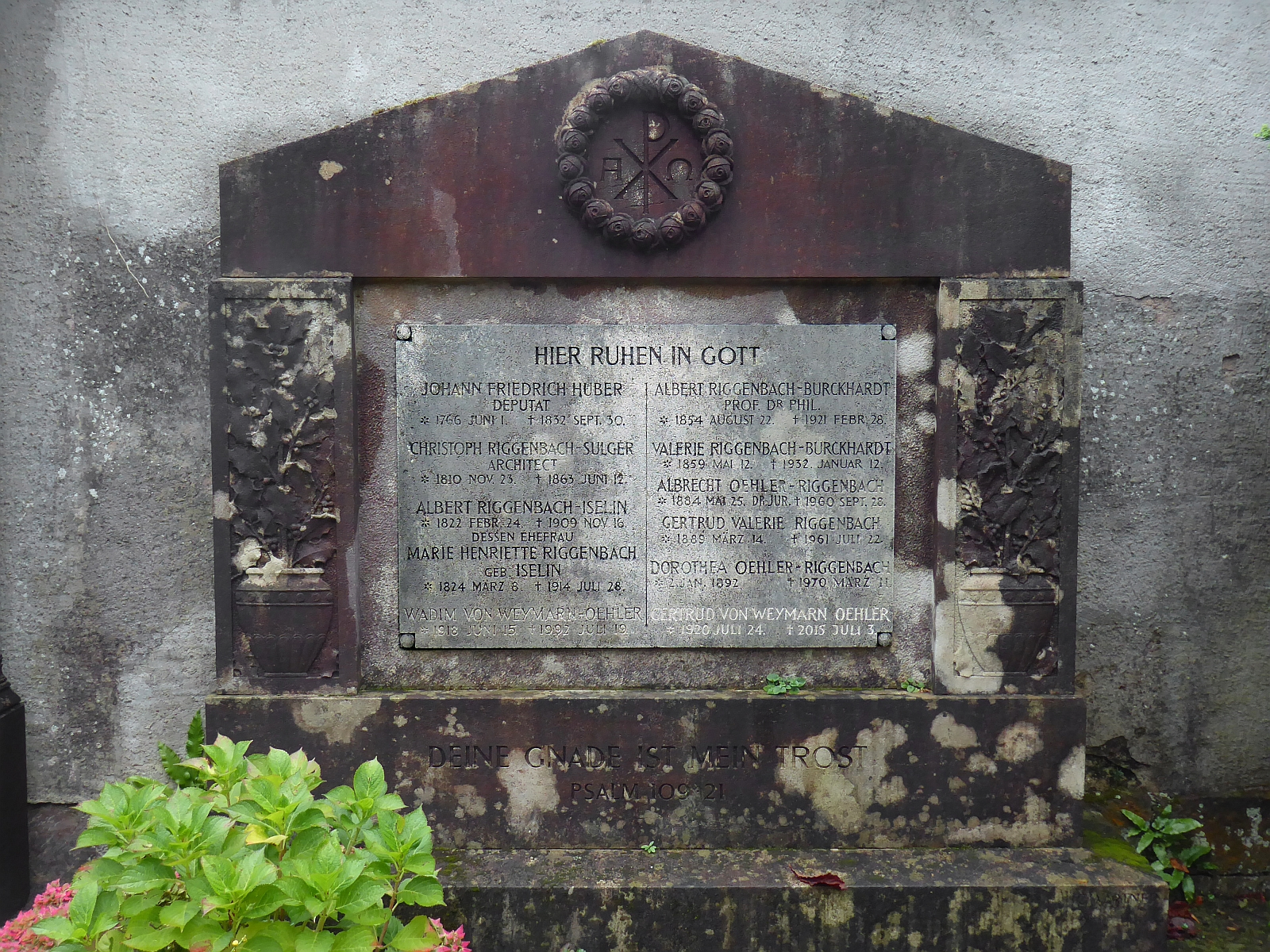 Christoph Riggenbach-Sulger (1810–1863) Architekt. Grab auf dem Friedhof Wolfgottesacker, Basel